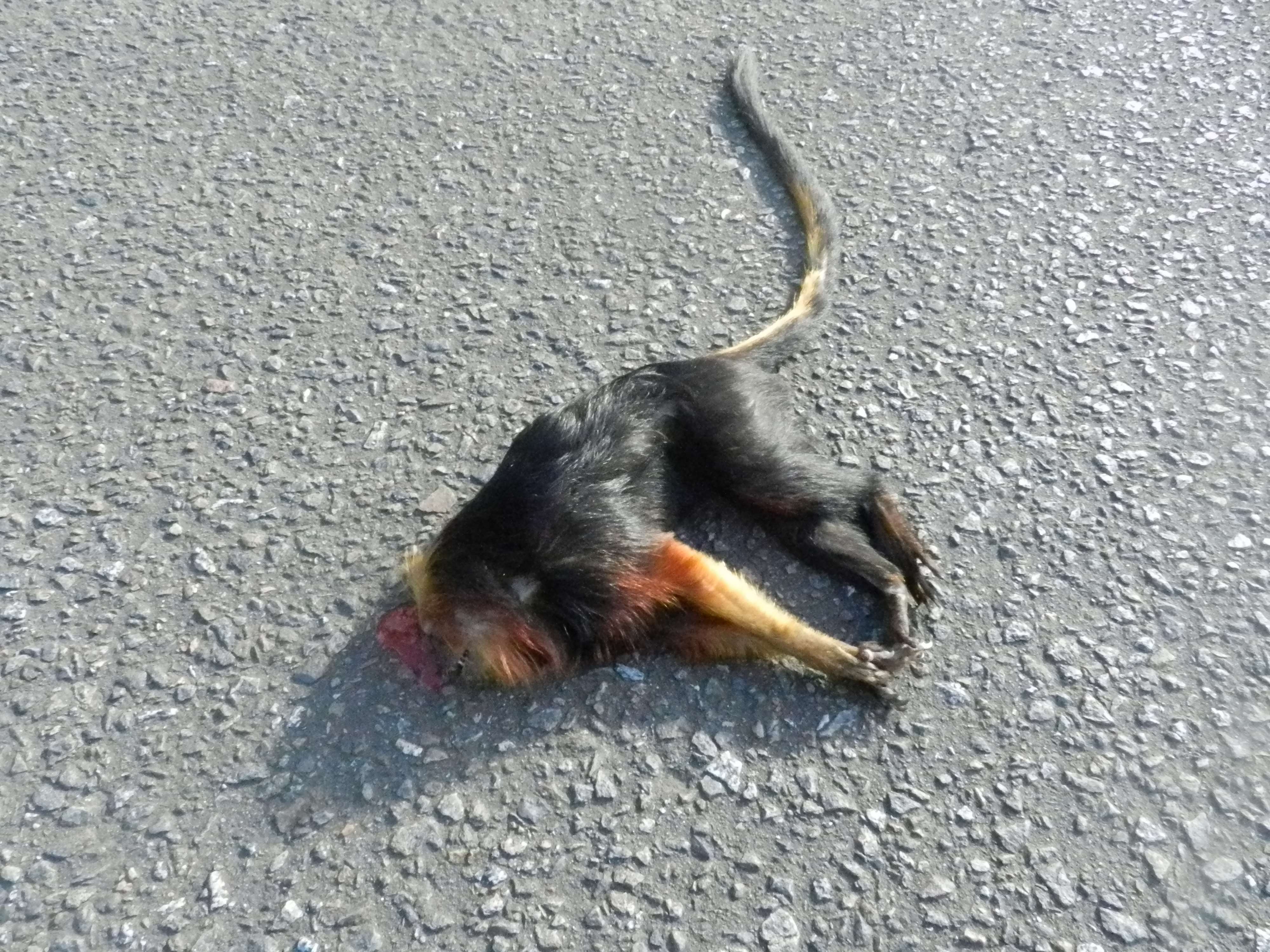 L. chrysomelas encontrado na estrada BA-262, entre Ilhéus e Uruçuca